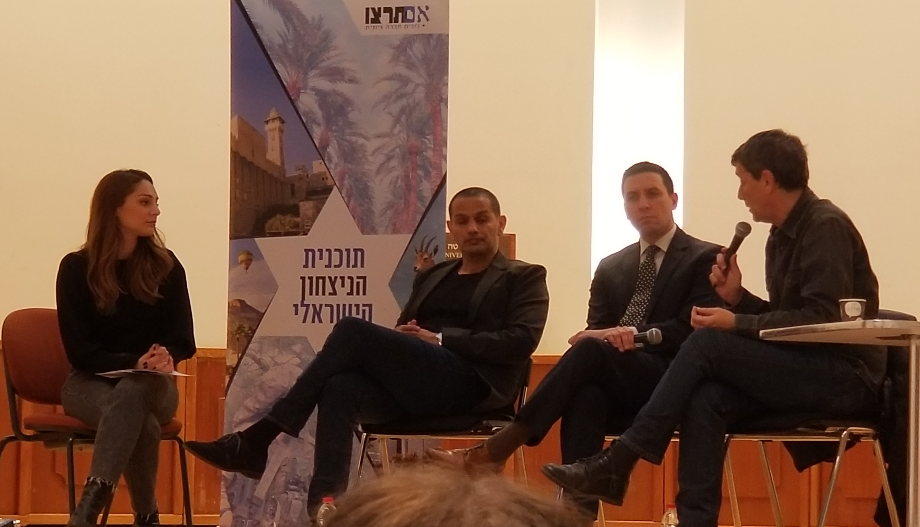 מעיין אדם, יוסי יהושוע, אטילה שומפלבי, ויואב לימור